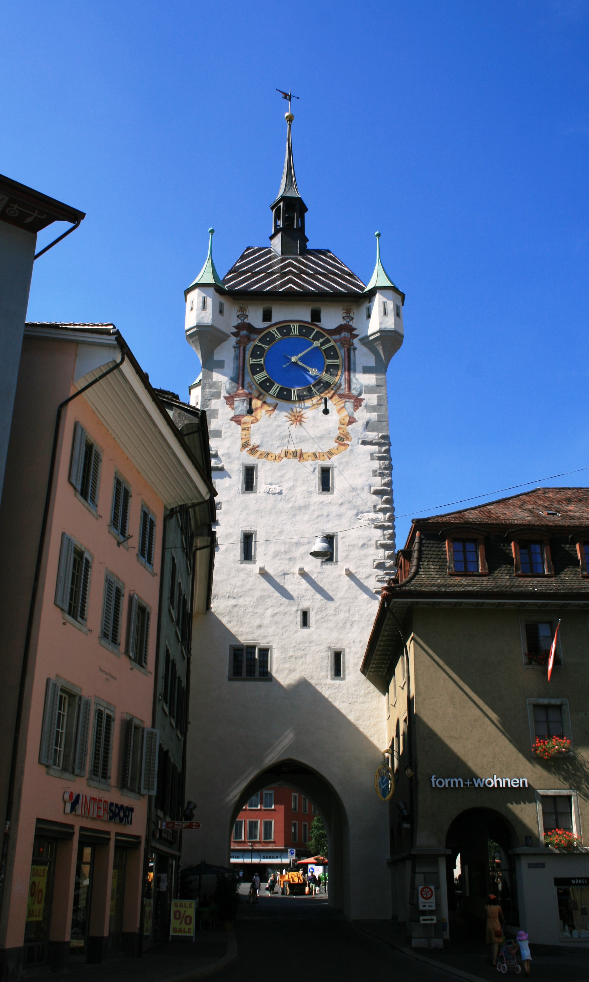 Stadtturm Baden, Schweiz Neu renoviert im "alten Stil" (so wie vor der Renovation von 1925) mit Fresko